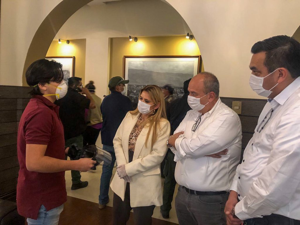 Adolescente boliviano produce protectores faciales contra el coronavirus